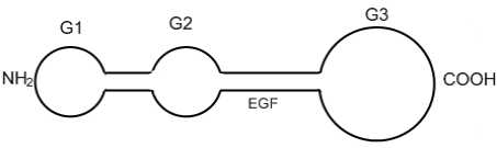 Nidogen